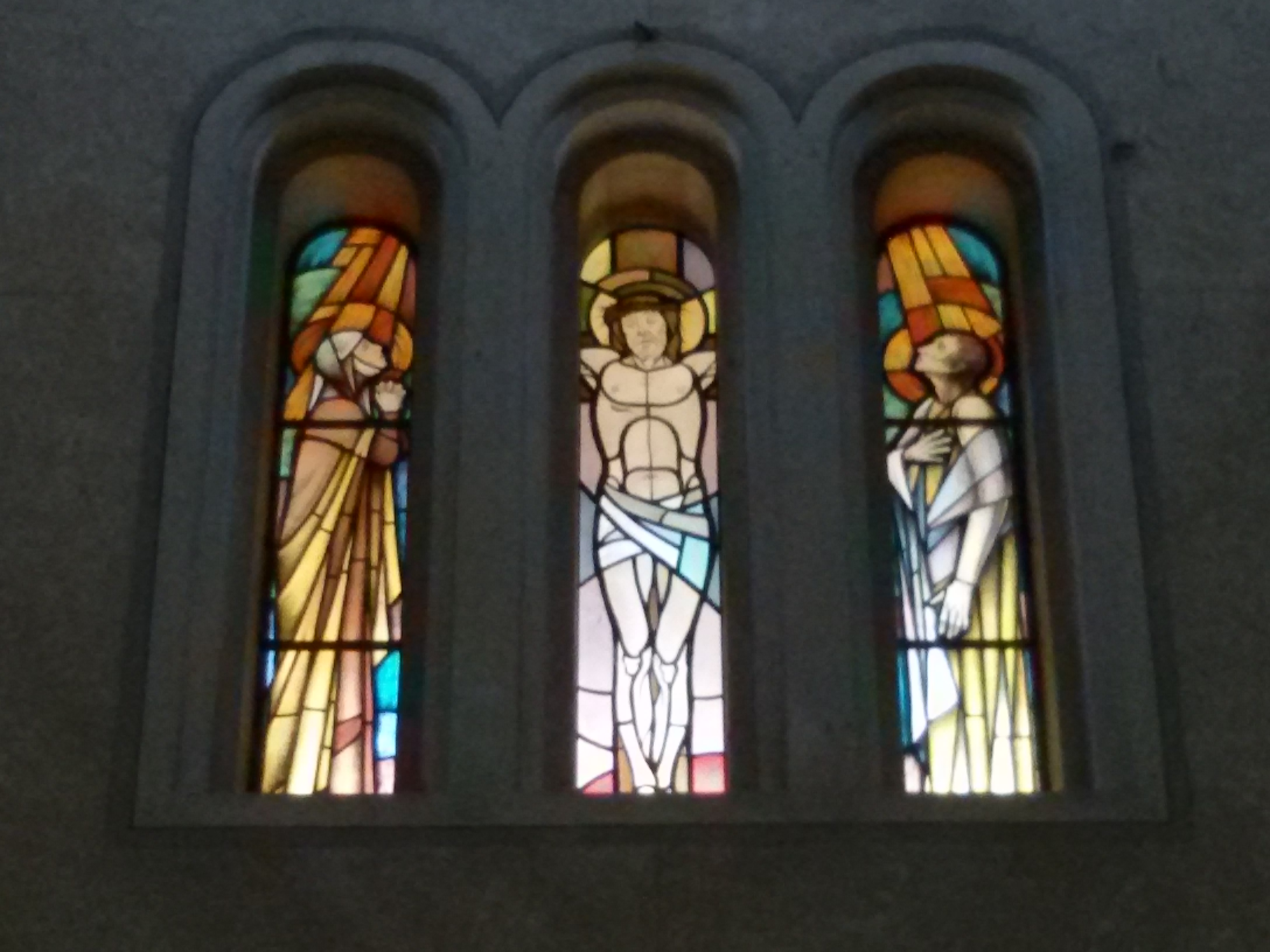 Chiesa di Santa Cristina Vergine e Martire del Tiverone